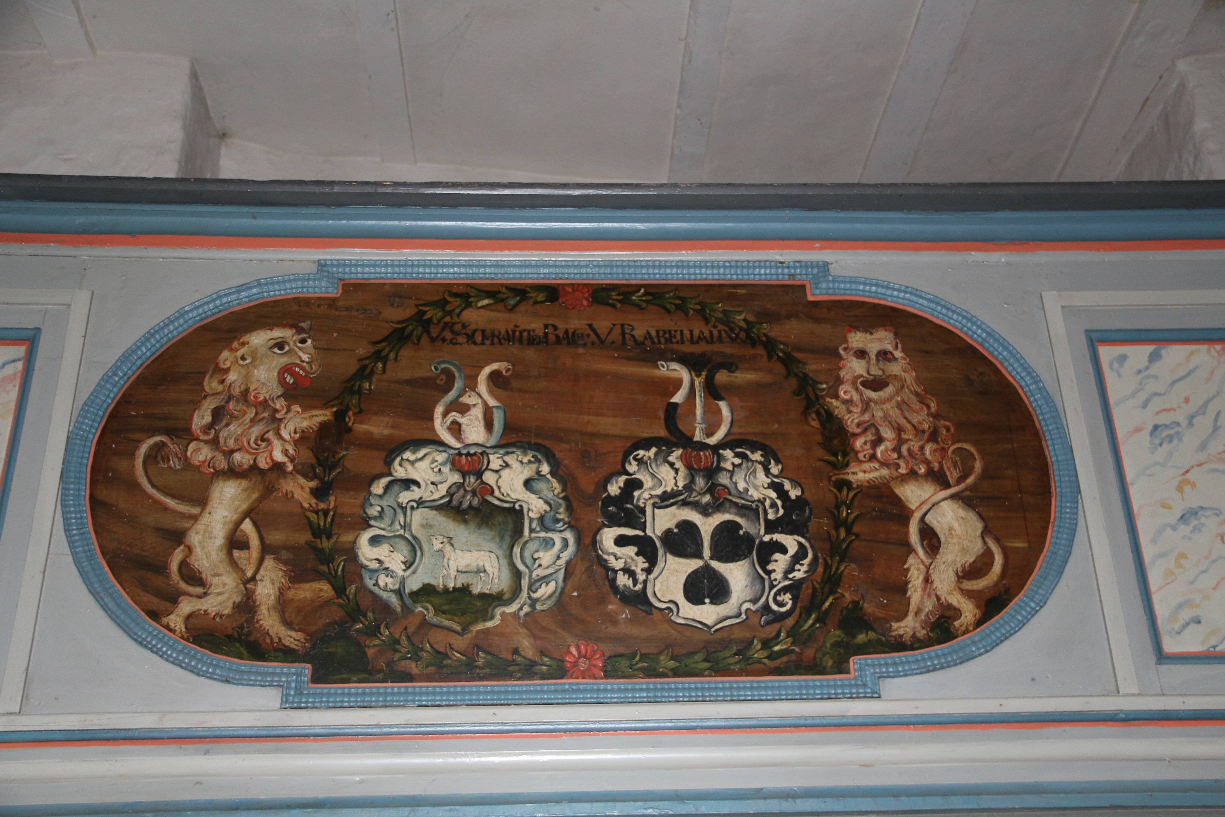 Evangelische Kirche Kirchberg (Lahn): links Wappen von Weitolshausen genannt Schrautenbach, rechts Wappen von Nordeck zur Rabenau